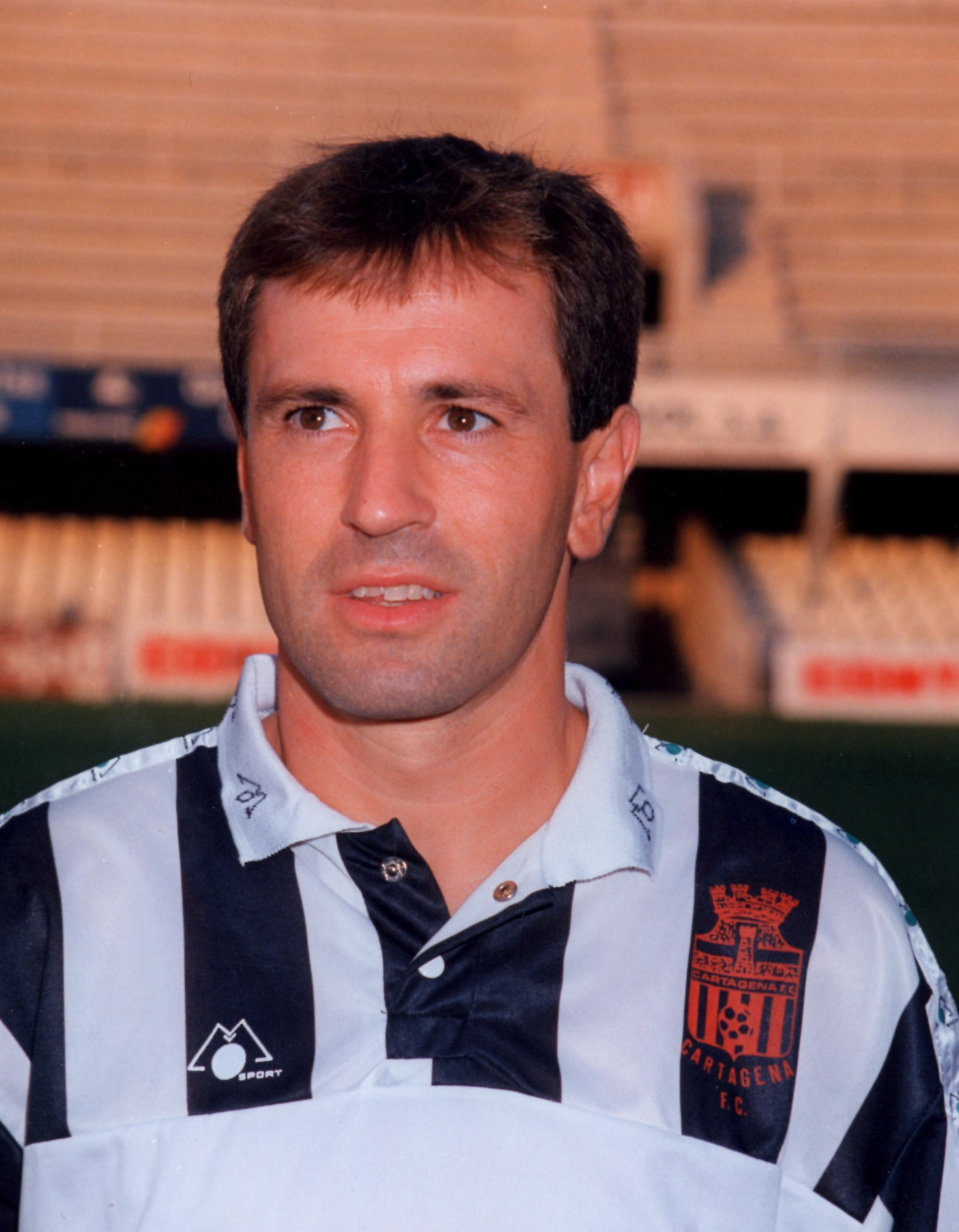 Alejandro «Jabato» Sagarduy, vistiendo los colores blanquinegros.